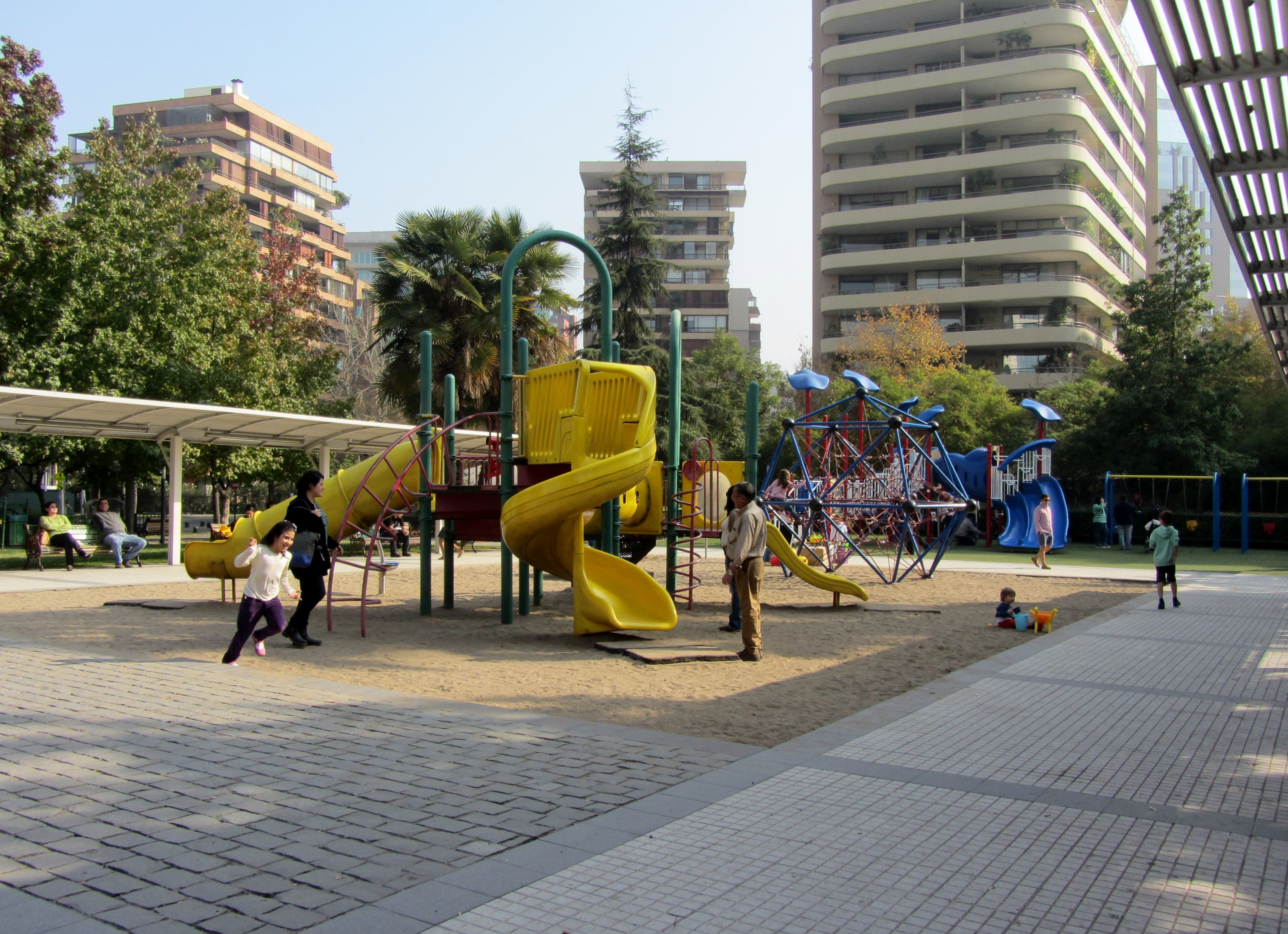 Juegos infantiles en la Plaza Perú, avenida Isidora Goyenechea